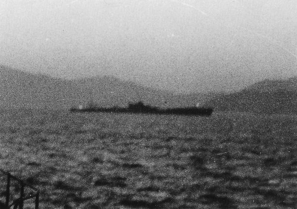 佐伯湾で訓練中の伊号第九潜水艦